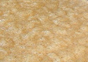 Fermentation in process